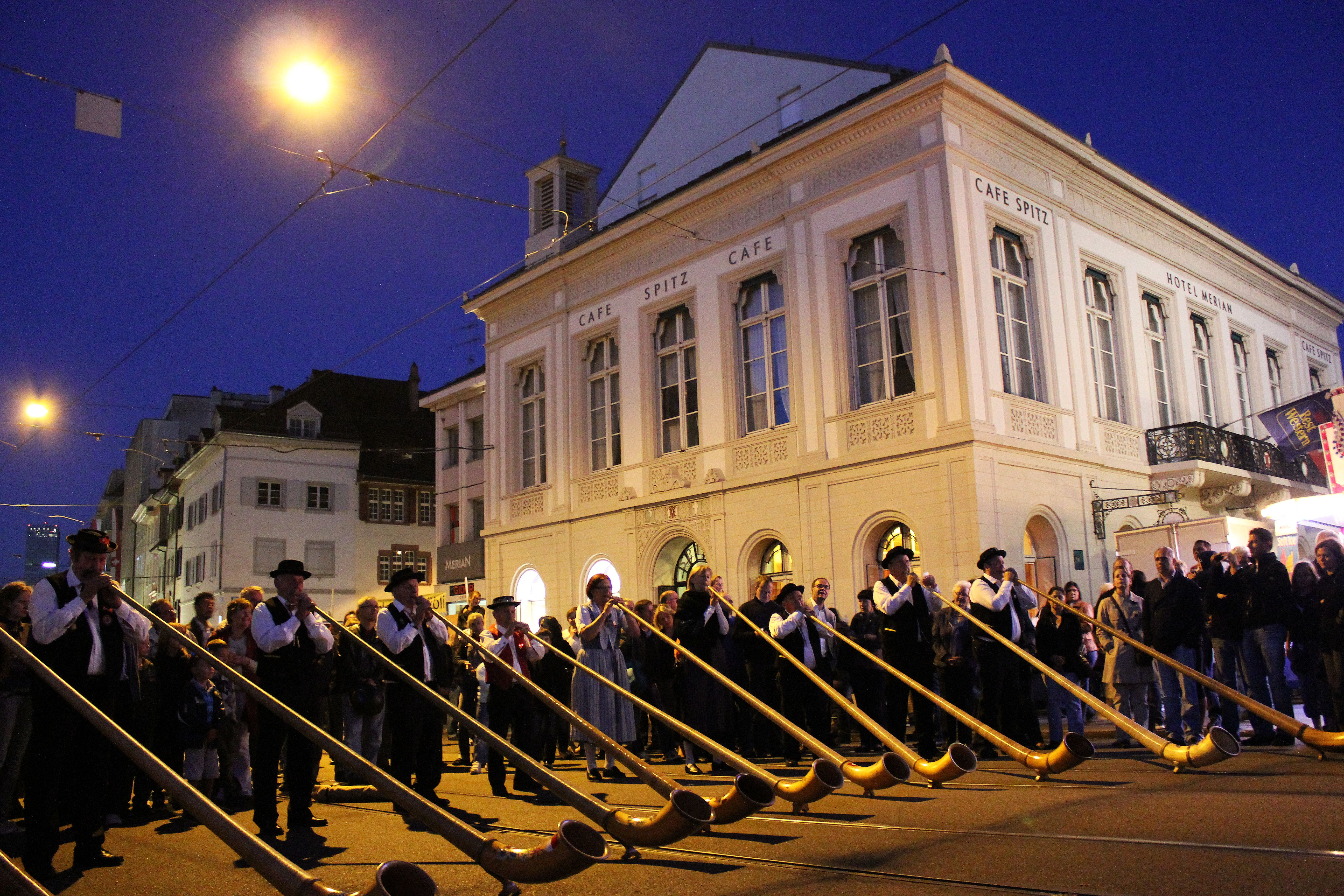 Basel bei Nacht. Alphorn-Gruppe Thierstein-Laufental vor dem Café Spitz und Hotel Merian. Bundesfeier 2011.